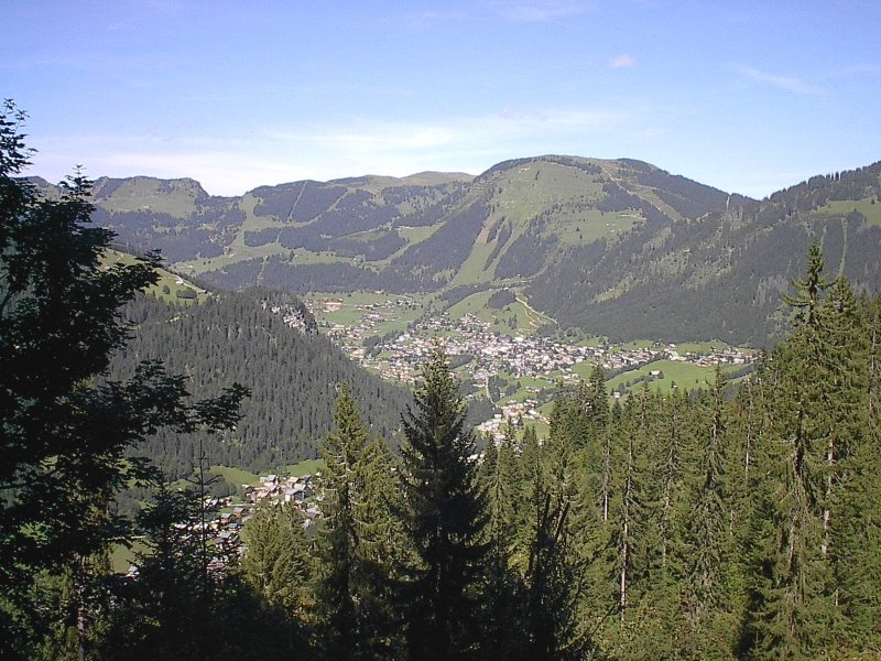 Vue générale de Châtel en été